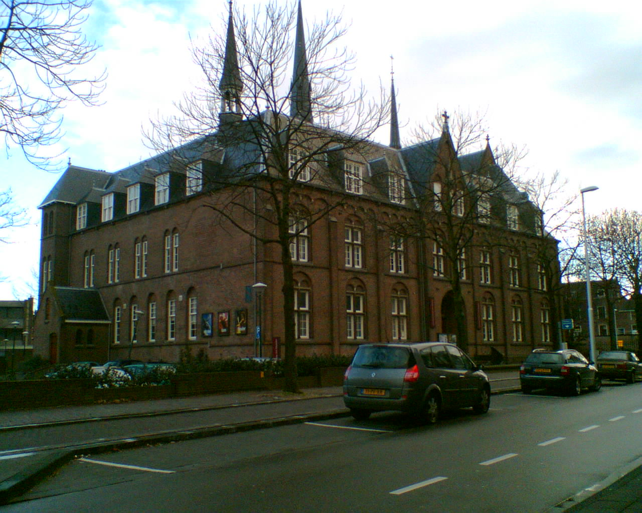 Woerden, Rijksmonument 512652.jpg Het Klooster, anno 2007 in gebruik als muziekschool en 'kunstencentrum'/theater.